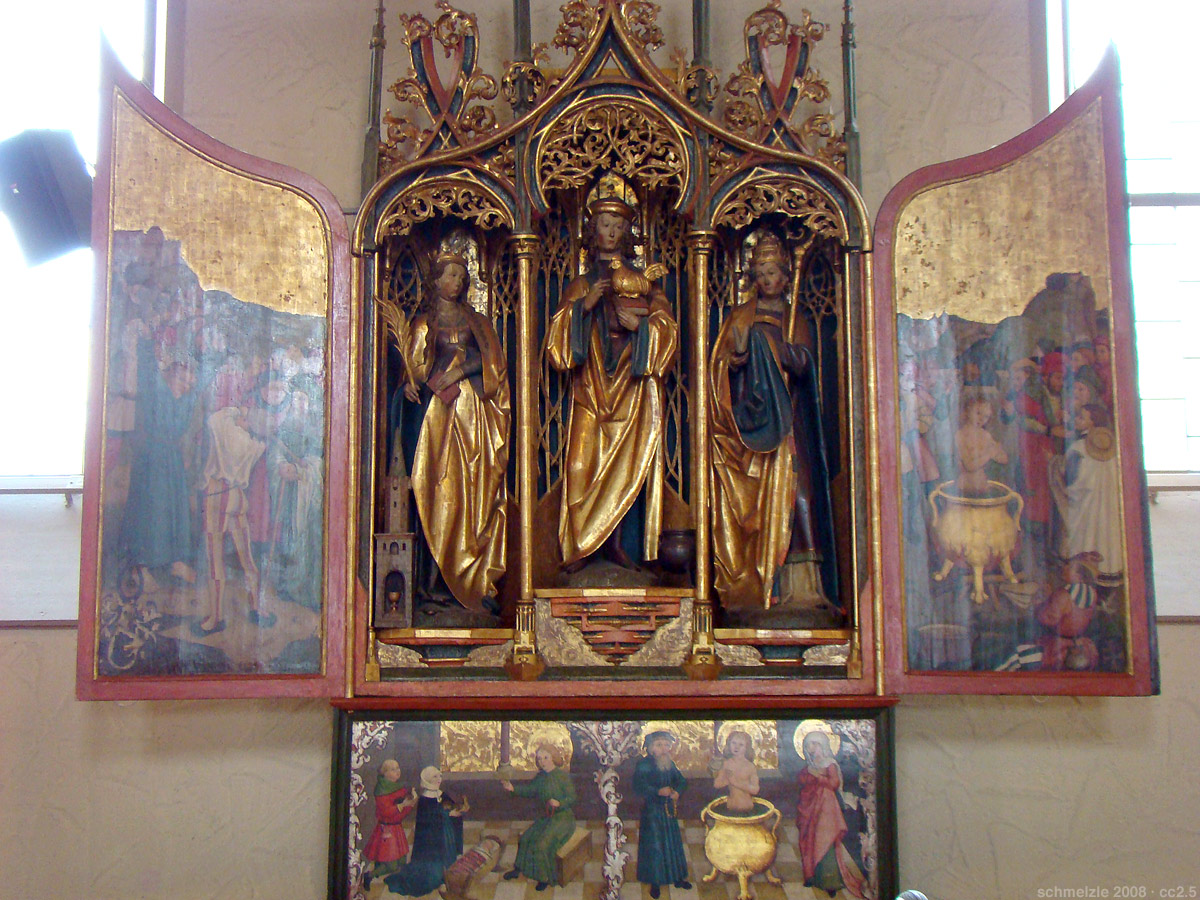 Veitsaltar in der Veitskirche in Flein (datiert 1514 o. 1517).